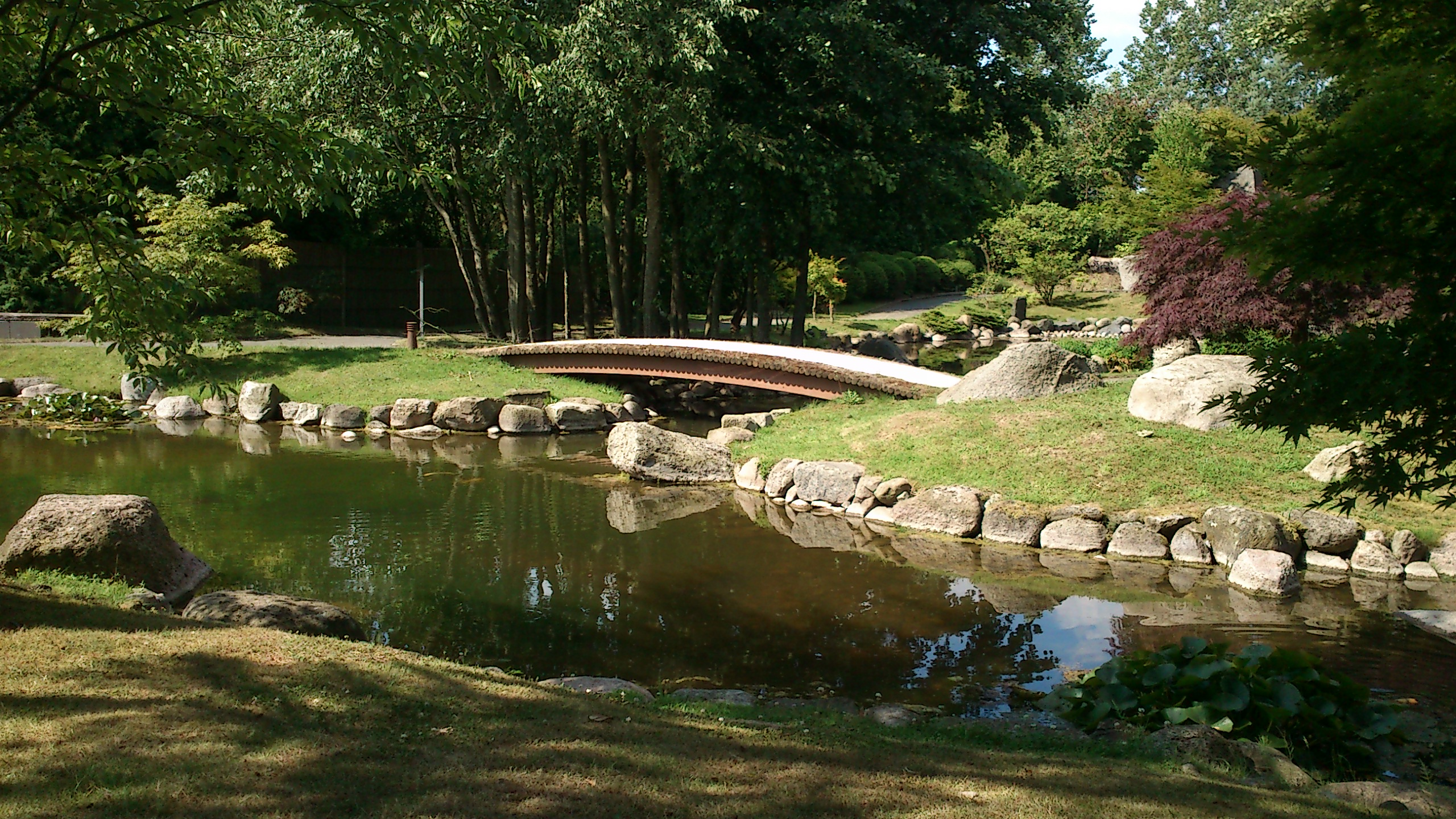 Fra Danmarks Japanske Have.